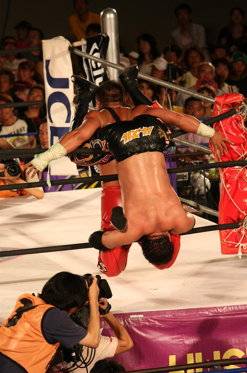 Tajiri performing LA Tarantula